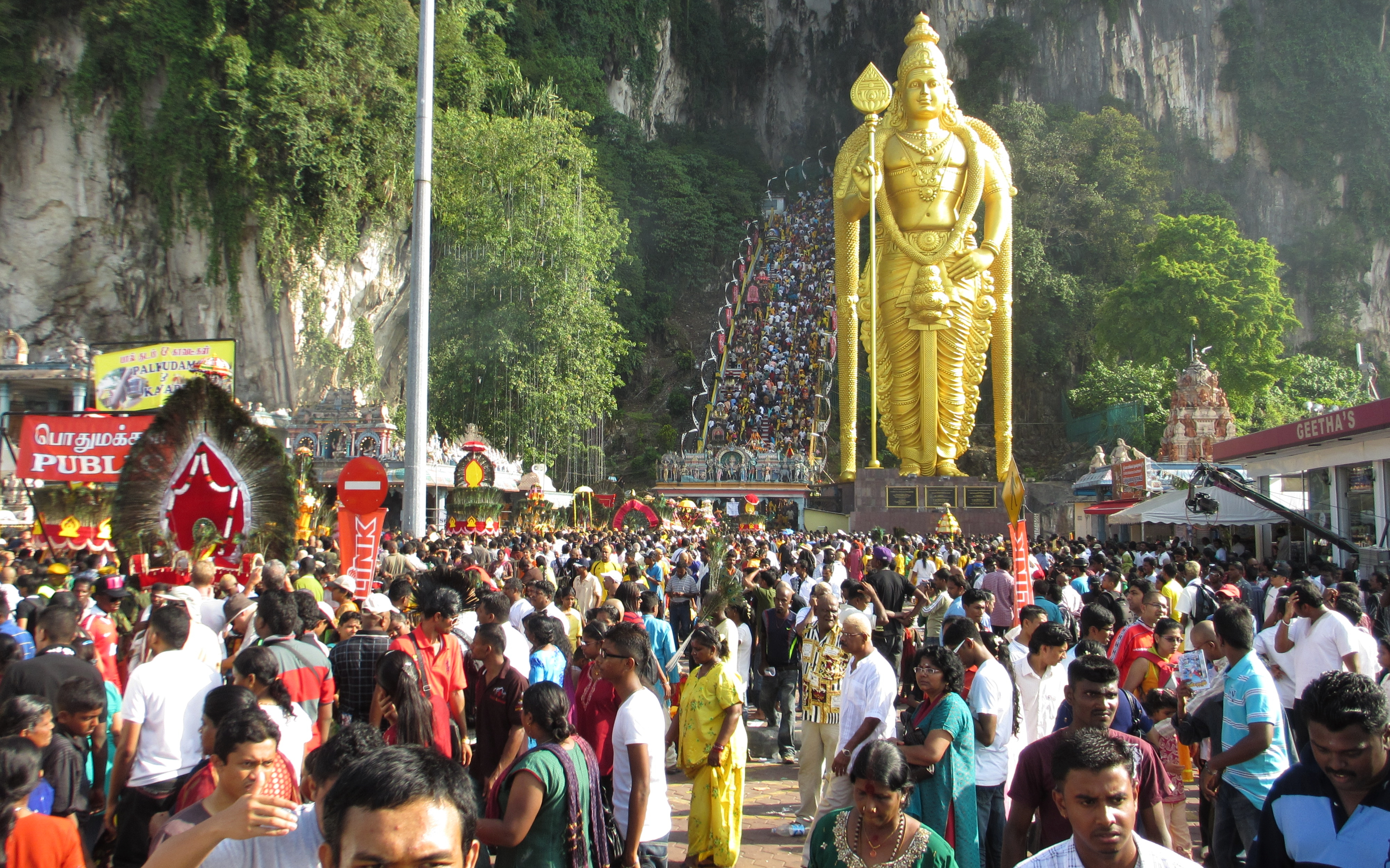 Taipusam Batu Caves, 2012